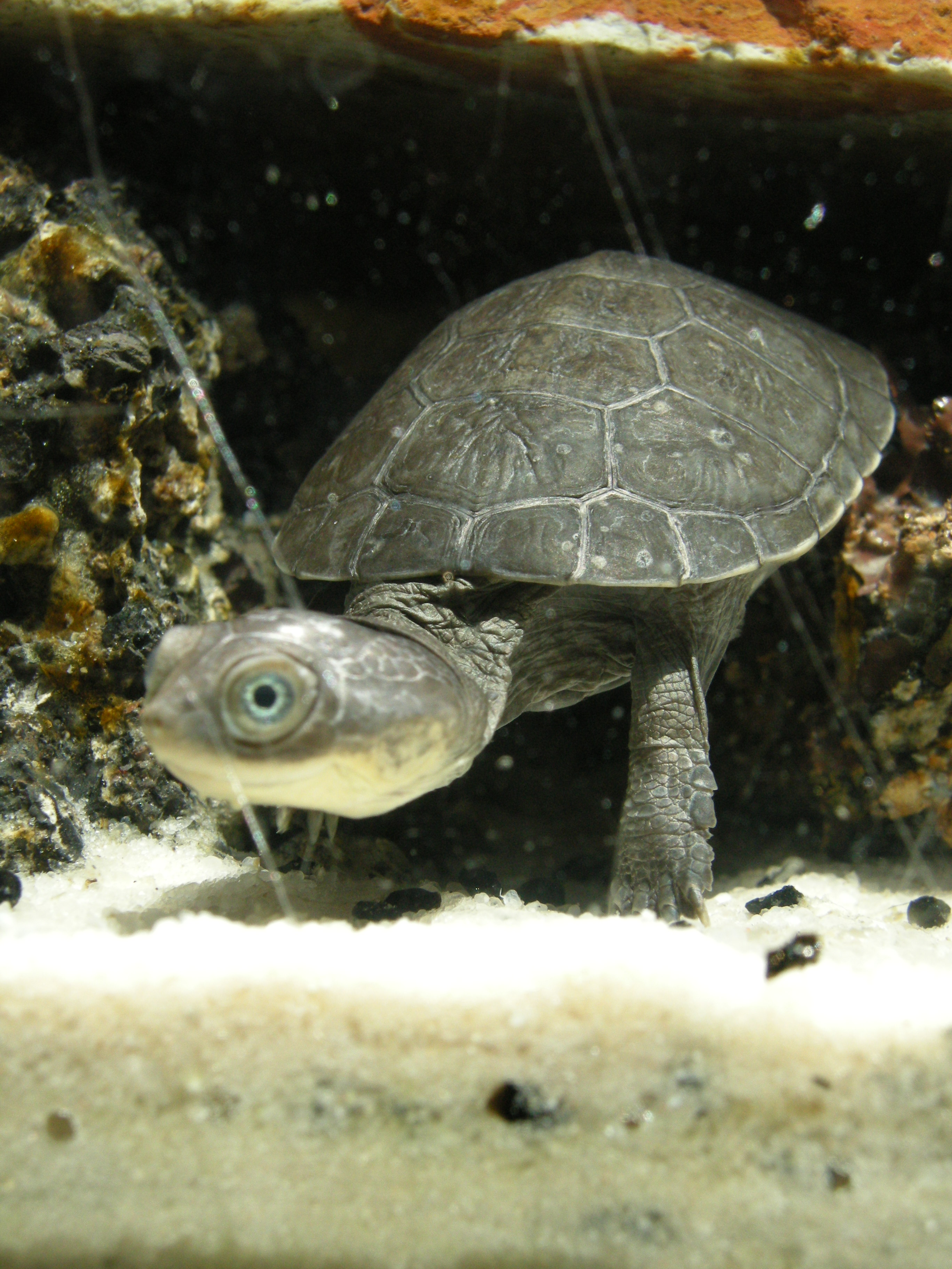 Tortue d'Afrique qui occupe en générale des petites mares d'eau stagnante.